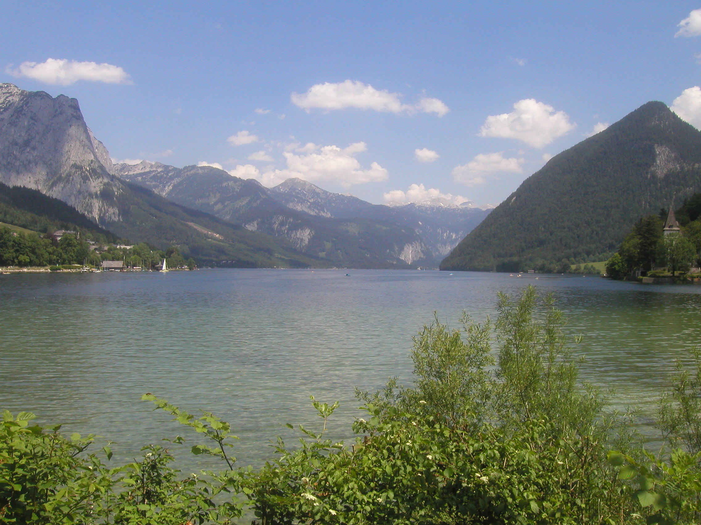 Der Grundlsee in der Steiermark, Blick nach Osten.